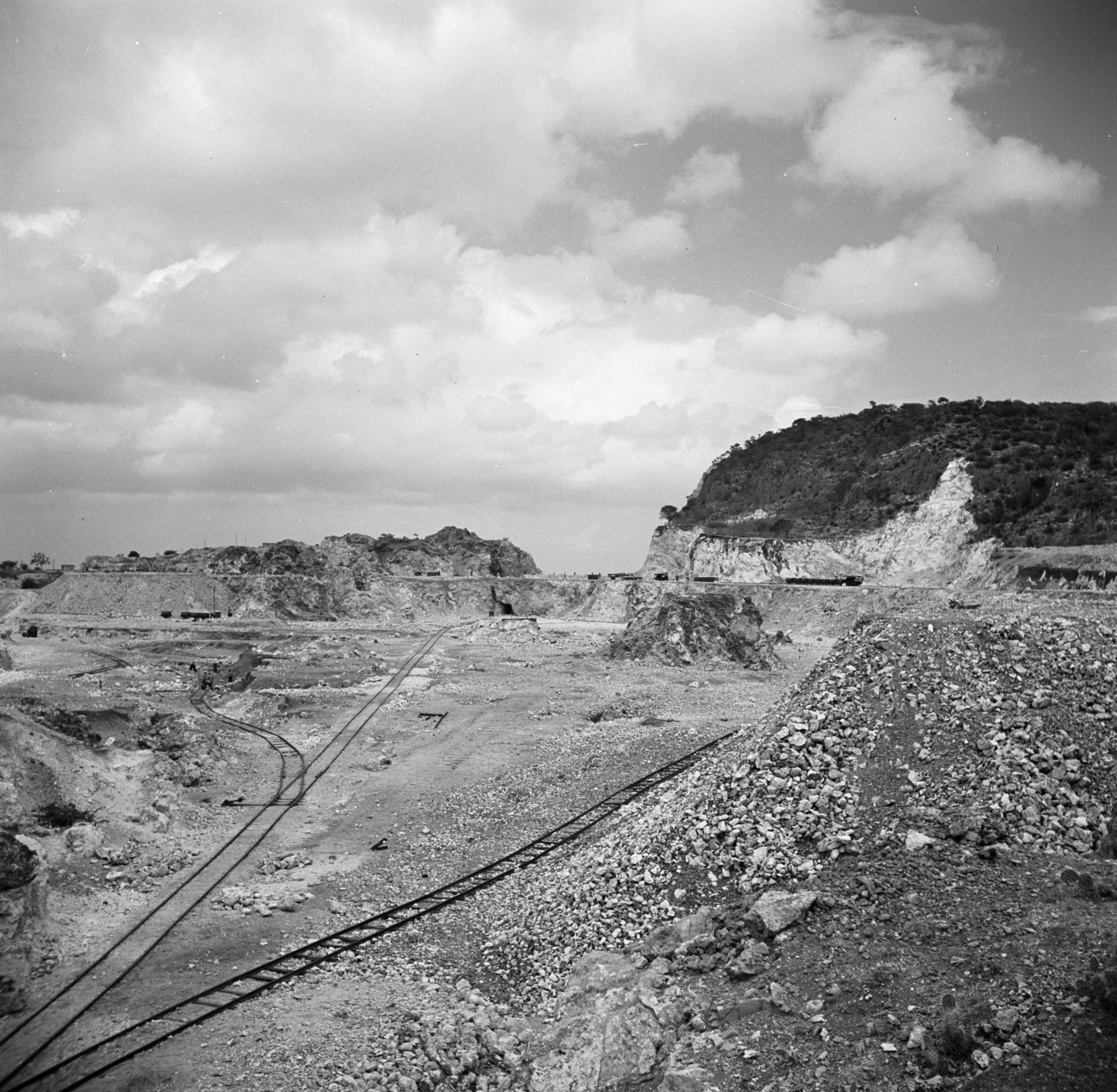 Collectie / Archief : Fotocollectie Van de Poll Reportage / Serie : Reis naar Suriname en de Nederlandse Antillen Beschrijving : De fosfaatmijn van het bedrijf Curaçao bij de Tafelberg op Curaçao Datum : 1947 Locatie : Curaçao Trefwoorden : mijnen, vervoer Fotograaf : Poll, Willem van de, [onbekend] Auteursrechthebbende : Nationaal Archief Materiaalsoort : Negatief (zwart/wit) Nummer archiefinventaris : bekijk toegang 2.24.14.02 Bestanddeelnummer : 252-7413